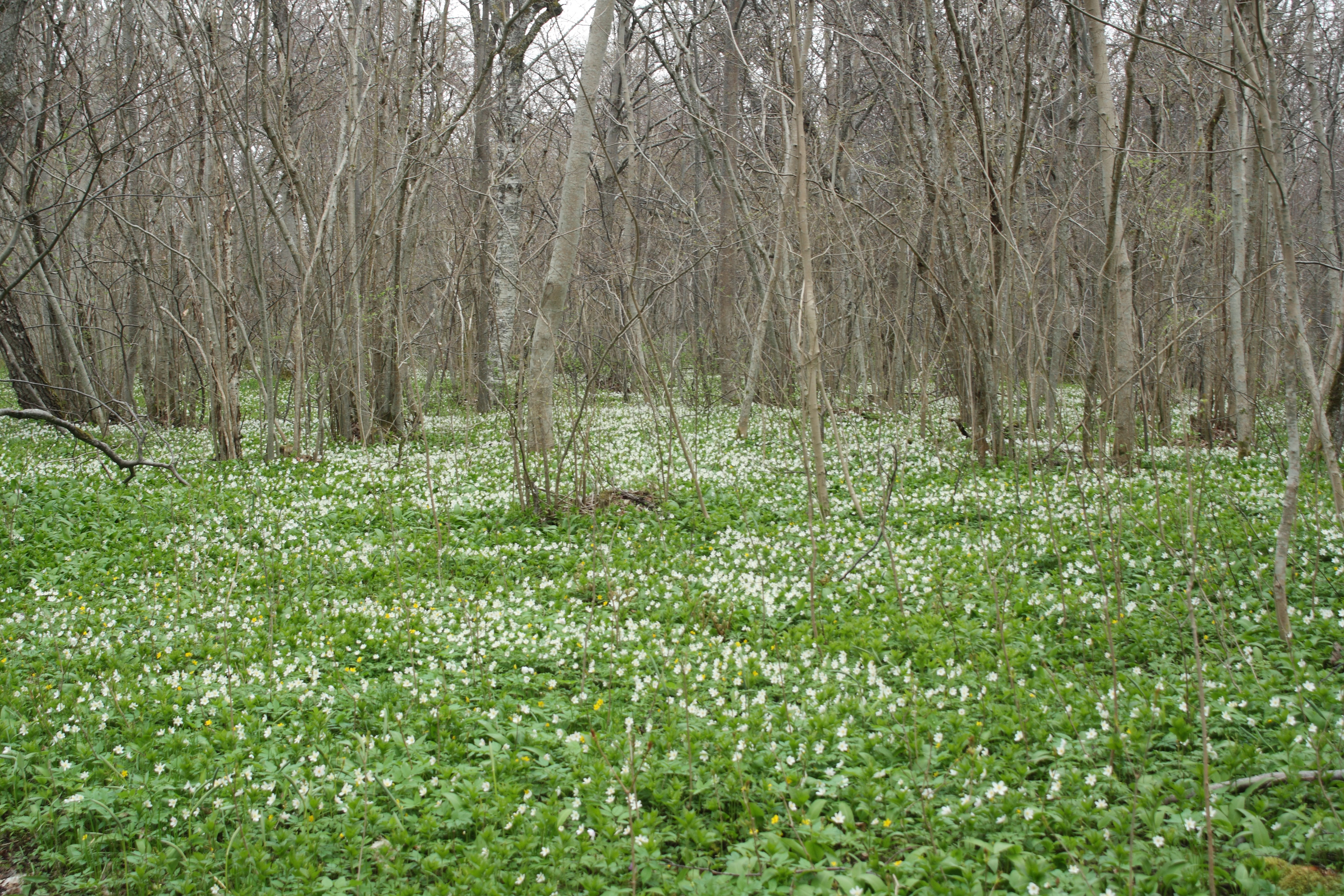 Kevadine Abruka salumets